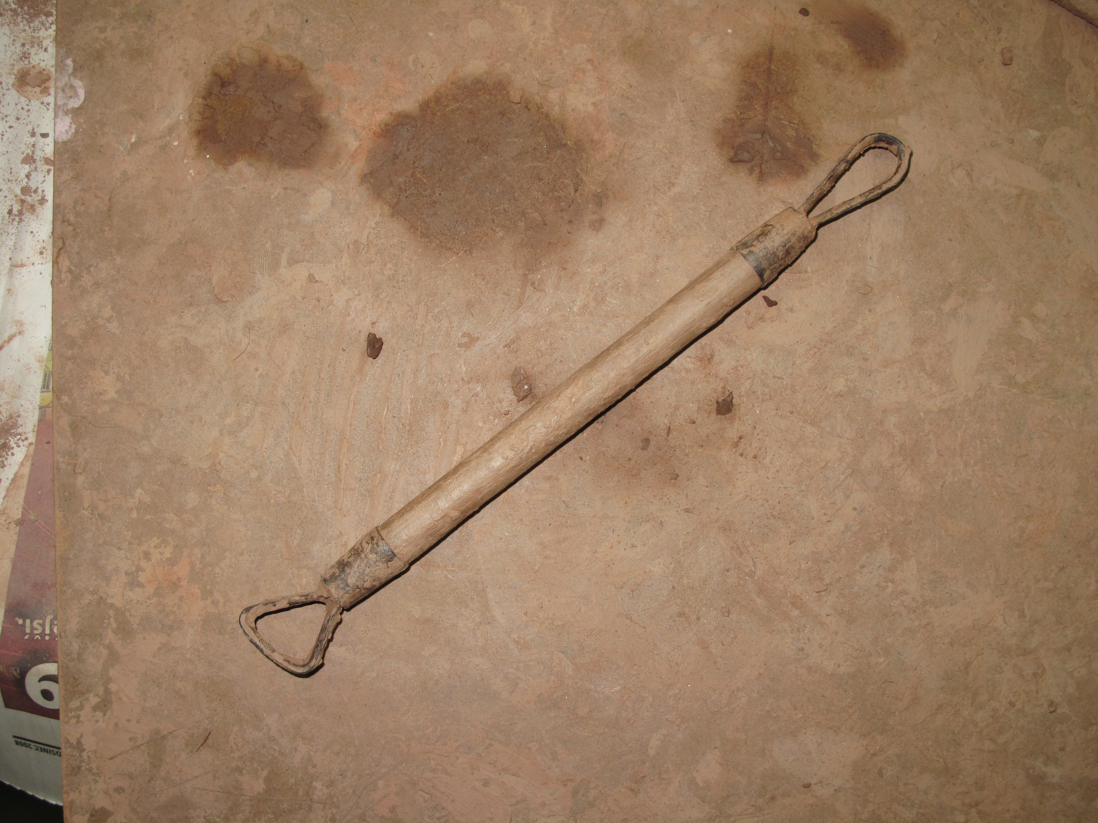 Očko - keramický nástroj na vydloubávání či oškrabávání keramické hlíny. Ateliér Hruška, Praha Smíchov.